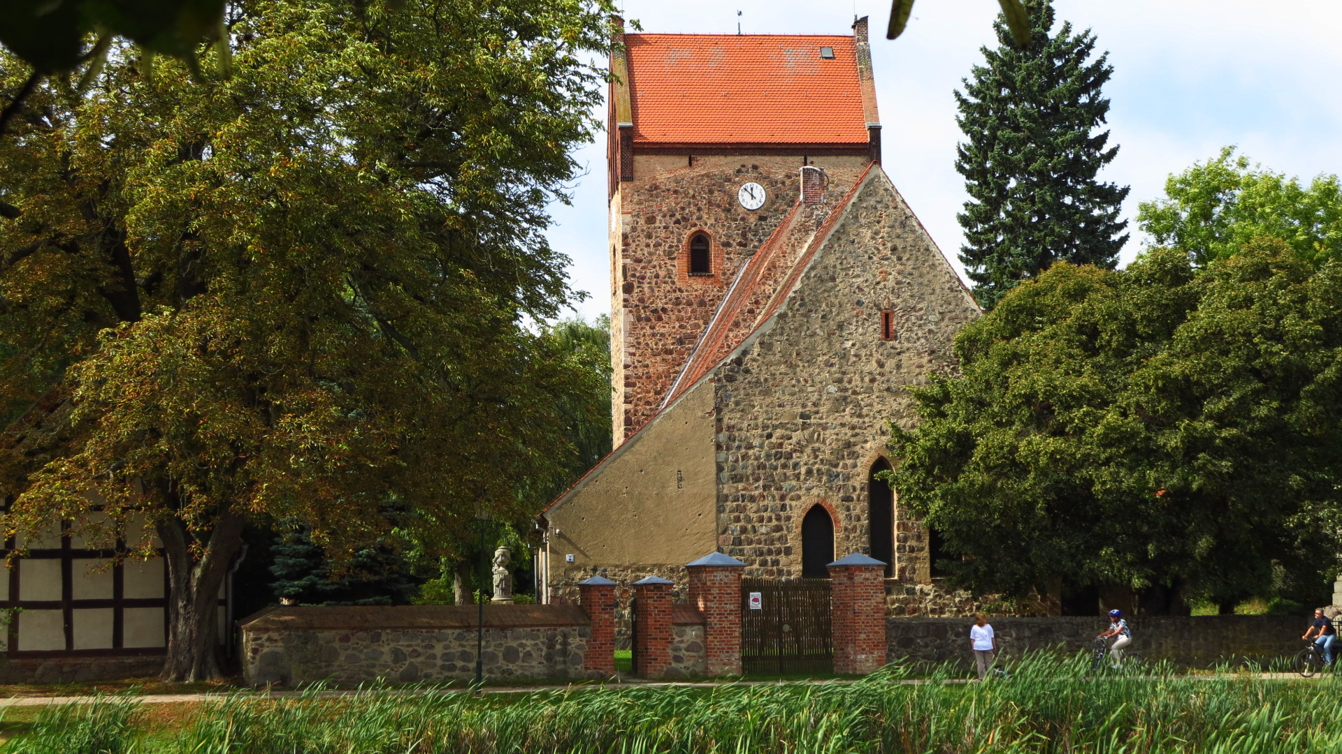 Blumberger Kirche, Nr. 8 in der Liste der Baudenkmale in Blumberg bei Ahrensfelde